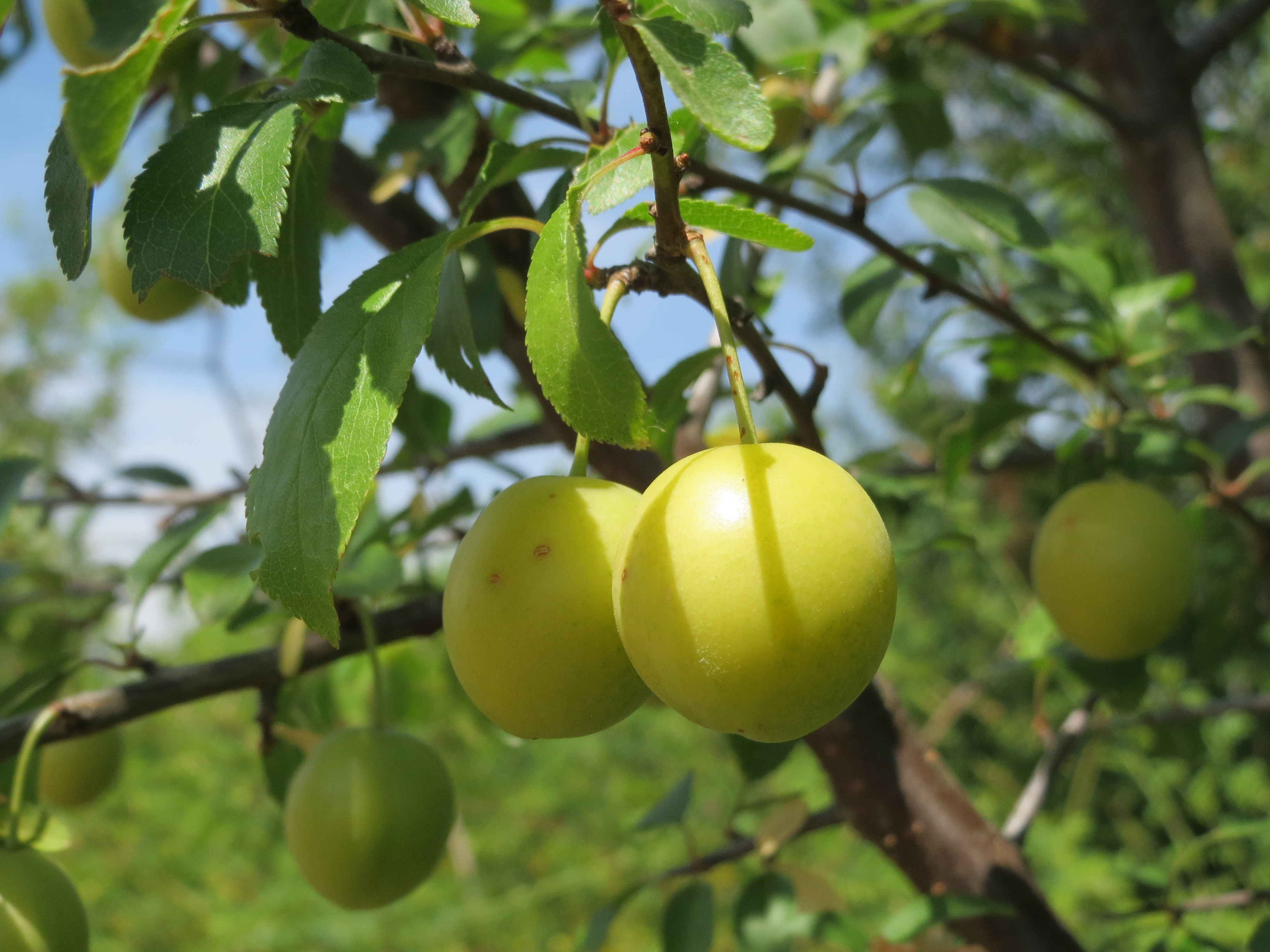 Kirschpflaume (Prunus cerasifera) bei Hockenheim